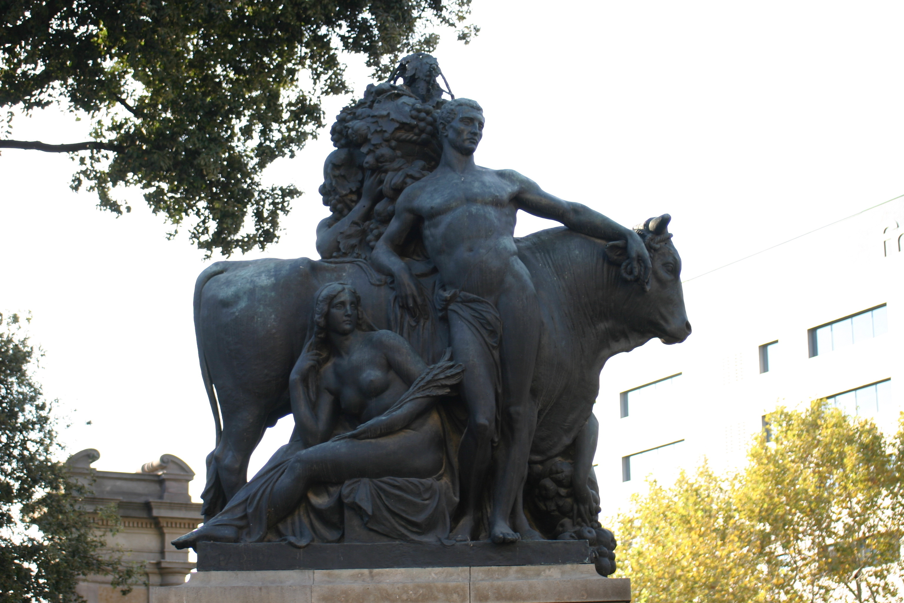 Girona. Plaza Catalunya. Barcelona (Spain) Codi: 2009